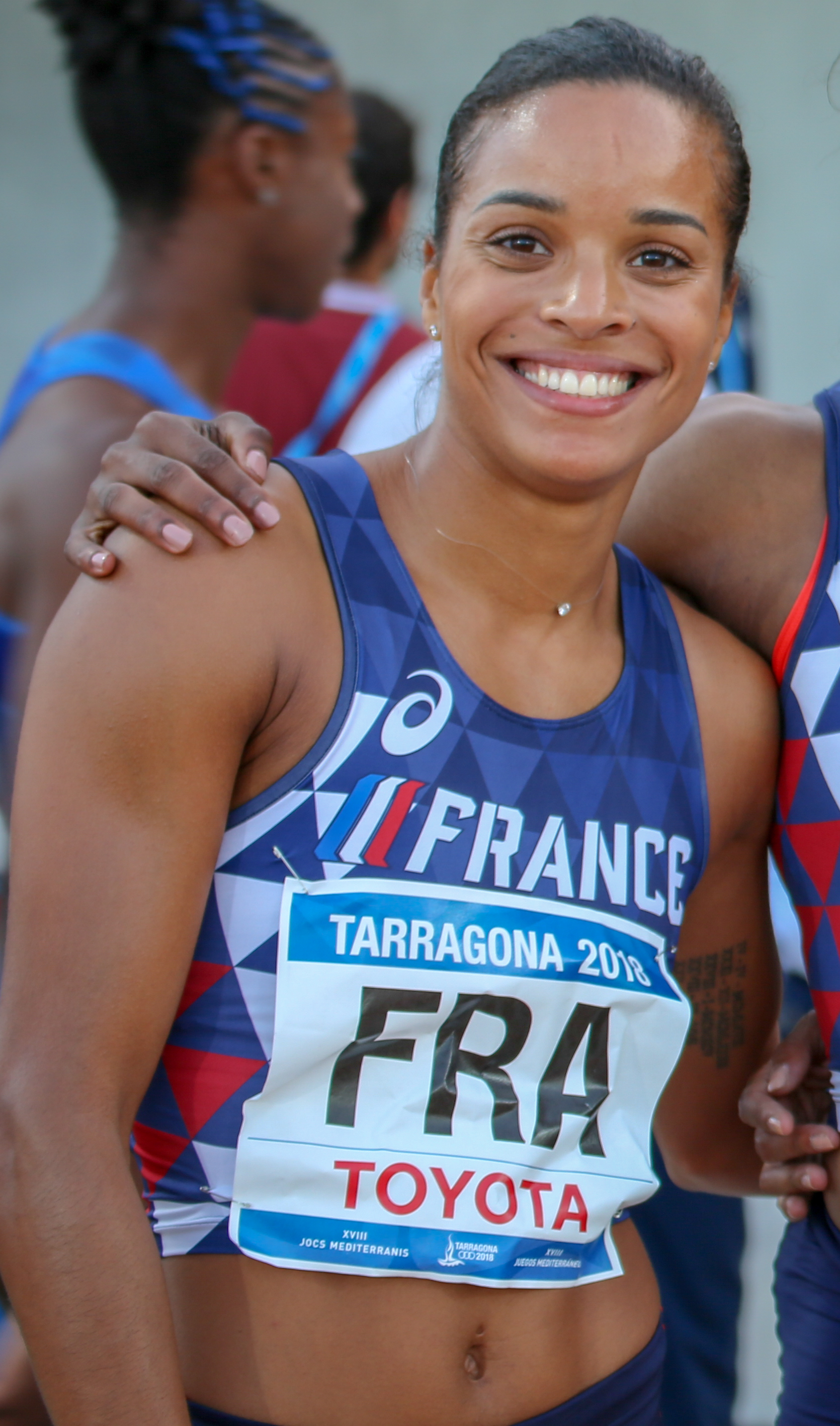 Orlann Ombissa-Dzangue en los relevos 4x100 en los Juegos del Mediterráneo 2018